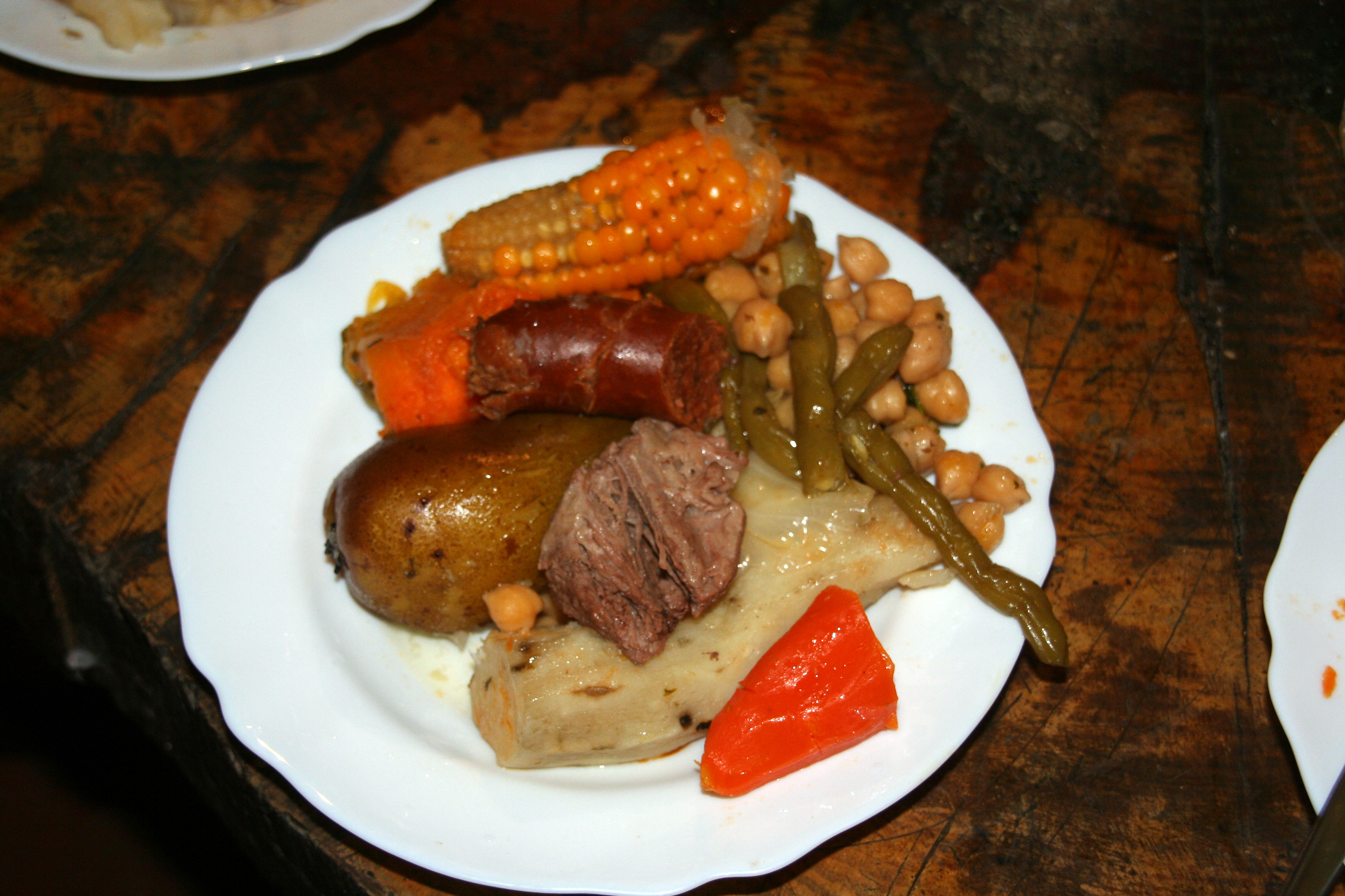 Puchero canario, compuesto por: carne de res, chorizo, costilla de cerdo, morcilla, batata, papas, pera, zanahoria, bubangos, chayotes, piña, habichuelas, garbanzos, calabaza y col.